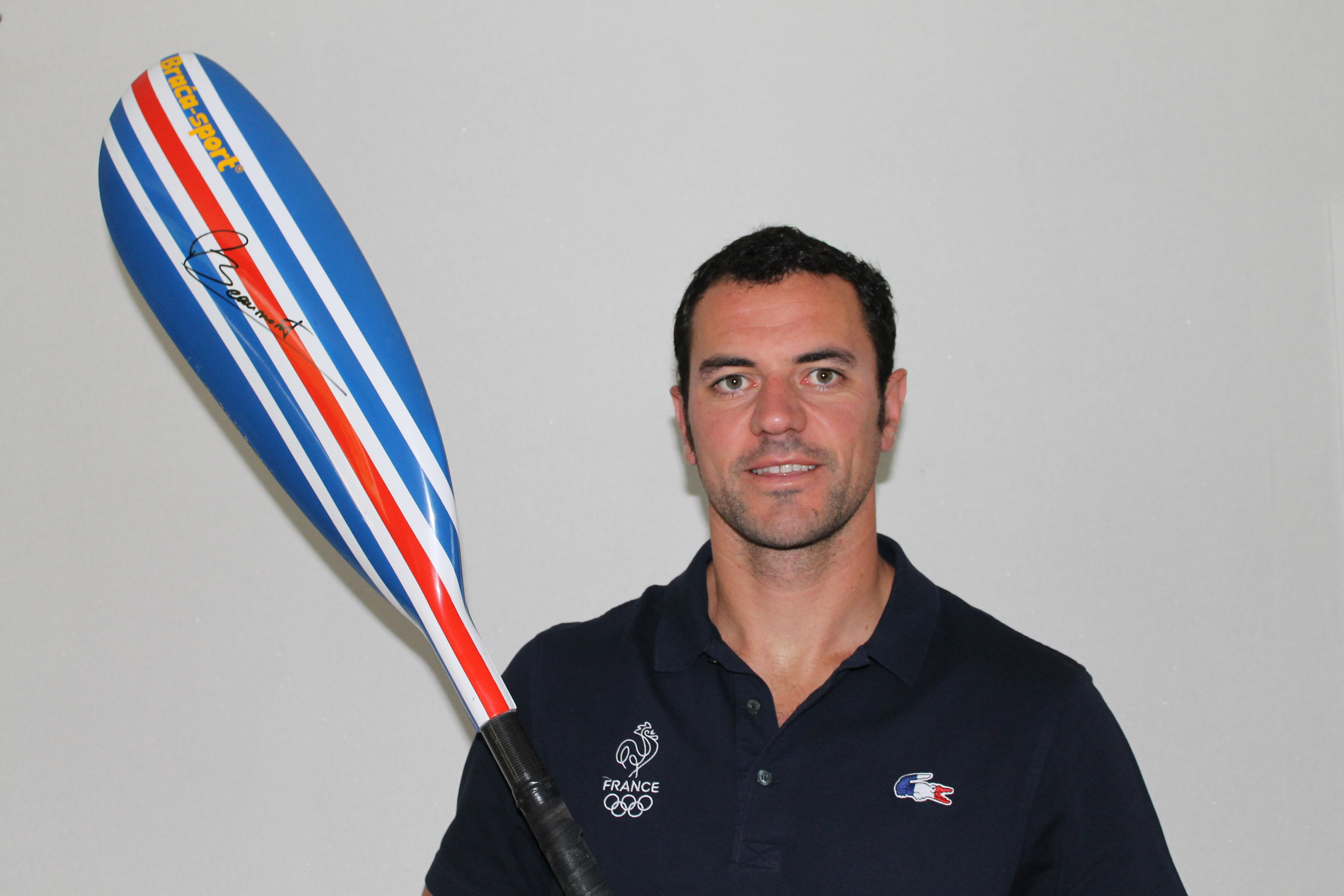 portrait